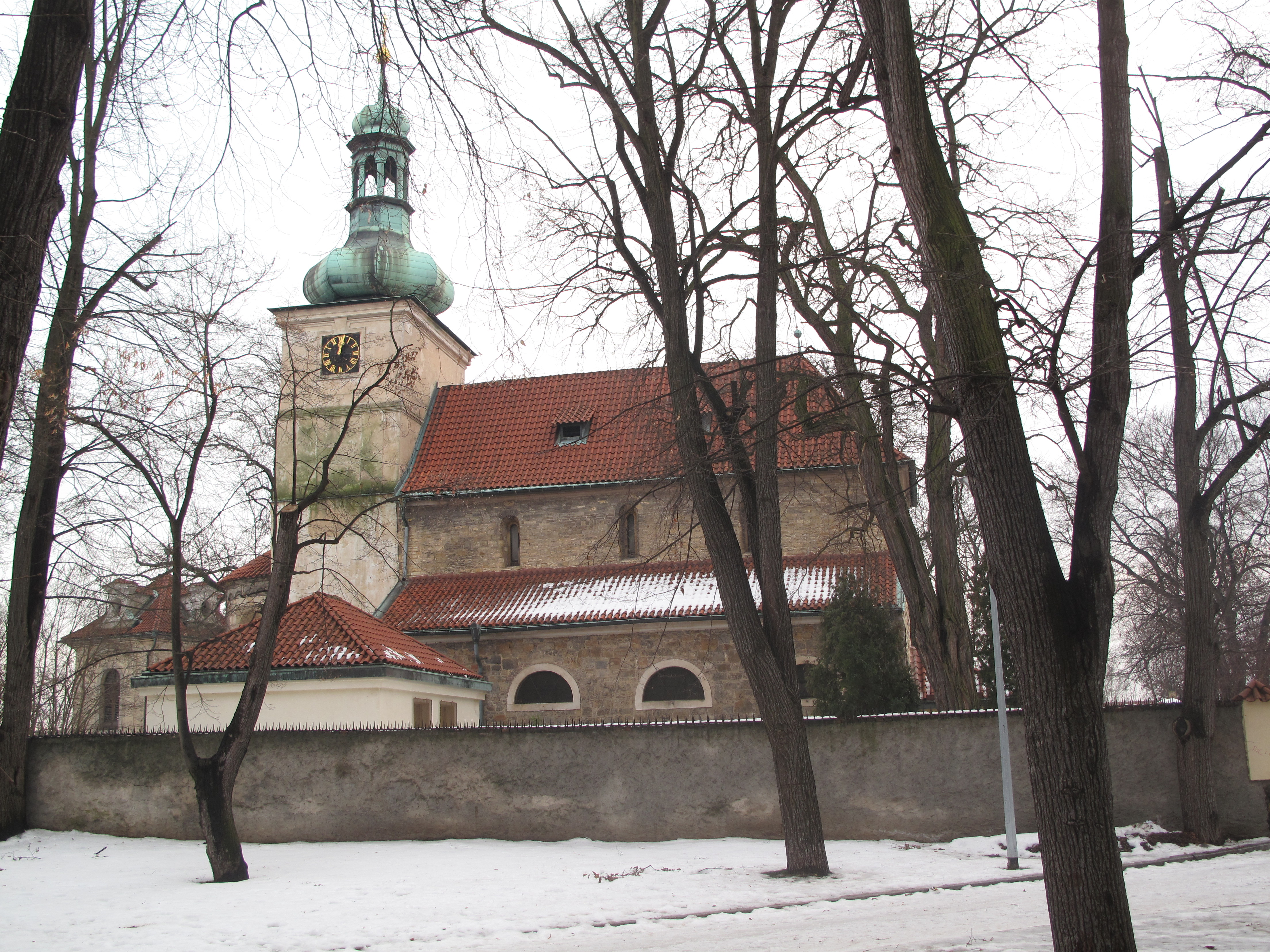 Kostel svatého Václava, Prosek